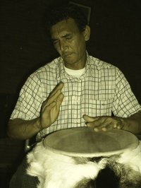 Pedro del Valle. Percusionista flocklorico colombiano.